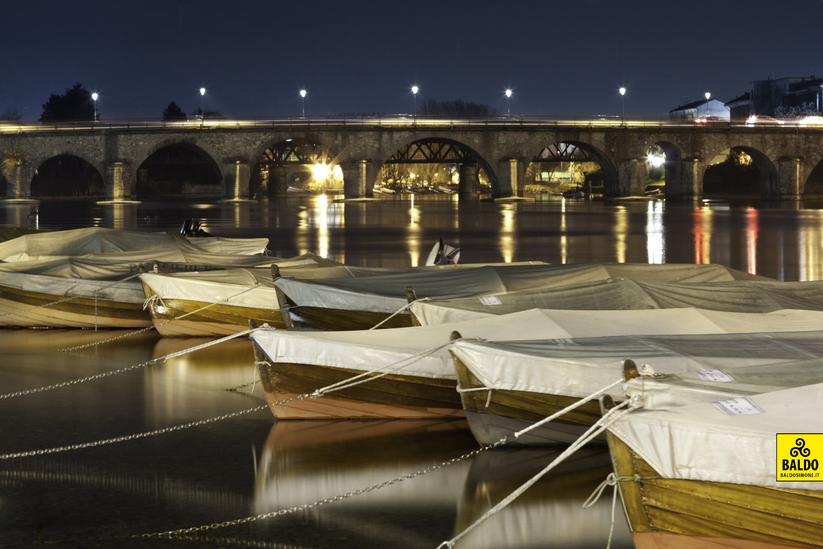 Pescarenico in Lecco e tipiche barche del Lago di Como